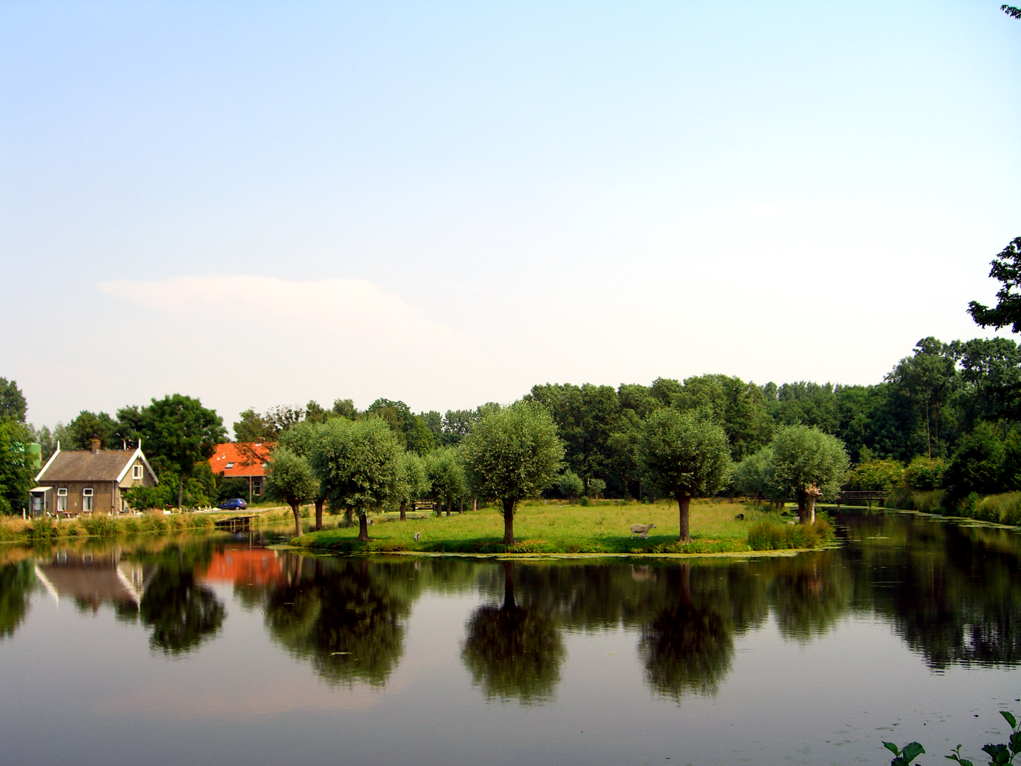 Het Loetbos, vanaf Restaurant de Loet te Lekkerkerk gezien. Foto gemaakt op 24-06-2005 door Bart Roorda te Lekkerkerk.